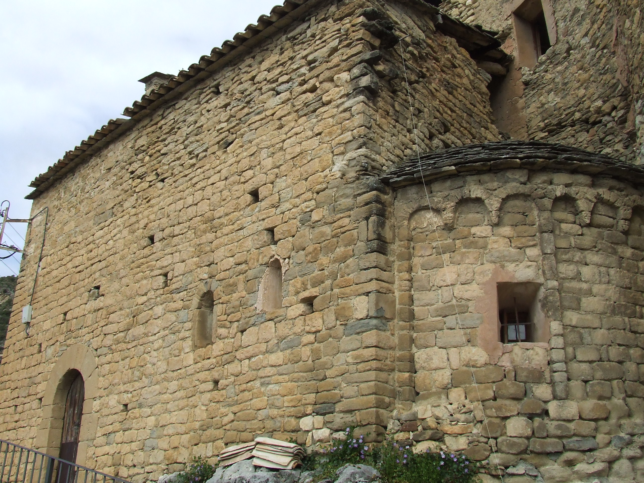 Façana de migdia i absis de Sant Salvador d'Estorm (Sant Esteve de la Sarga, Pallars Jussà)